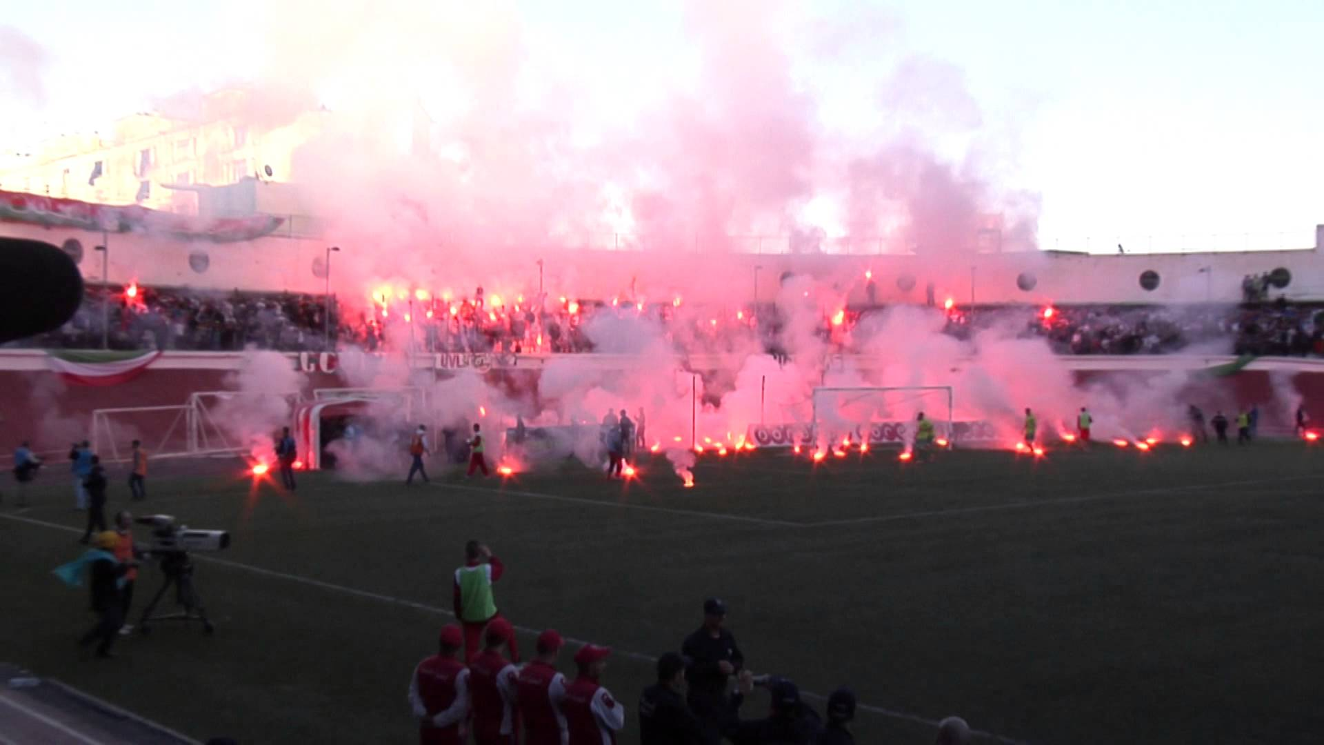 Derby de feu MCA-Crb